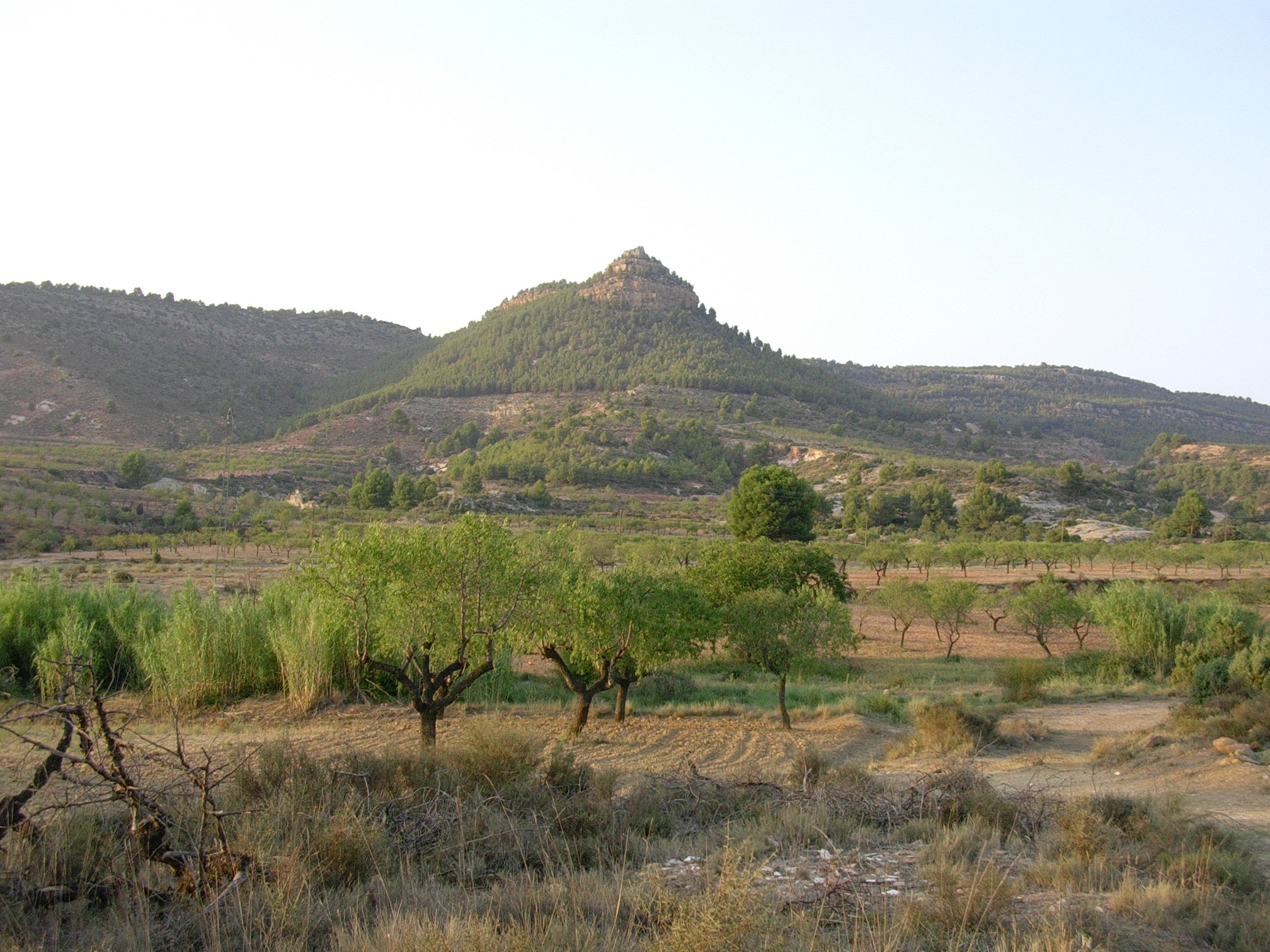 Vista del turó de La Làmpara de Titaigües